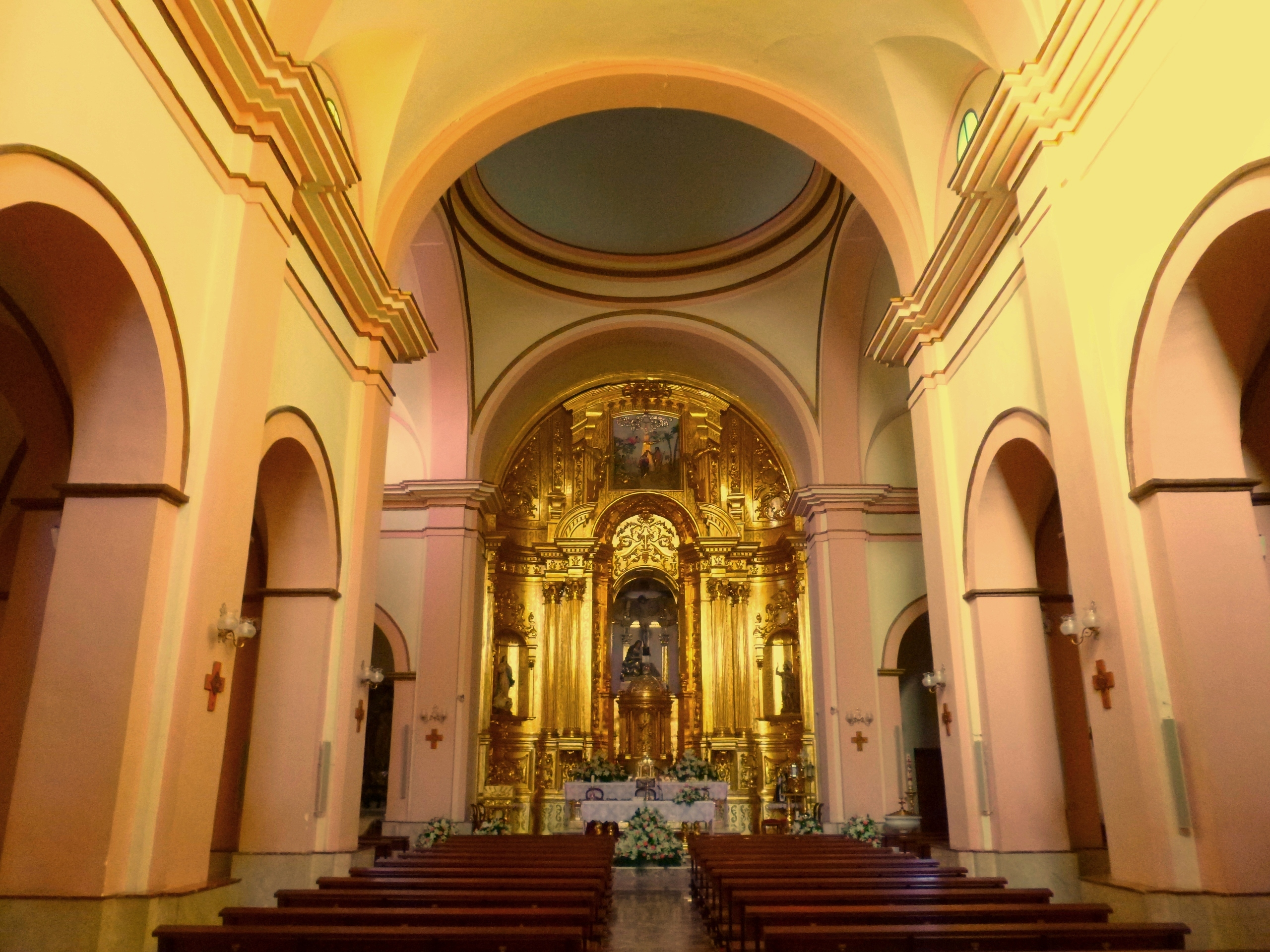 Iglesia Arciprestal de San Juan Bautista (Beniaján). Vista del interior de la nave central.